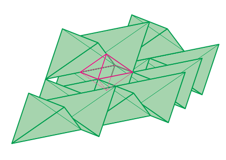 白スズ構造